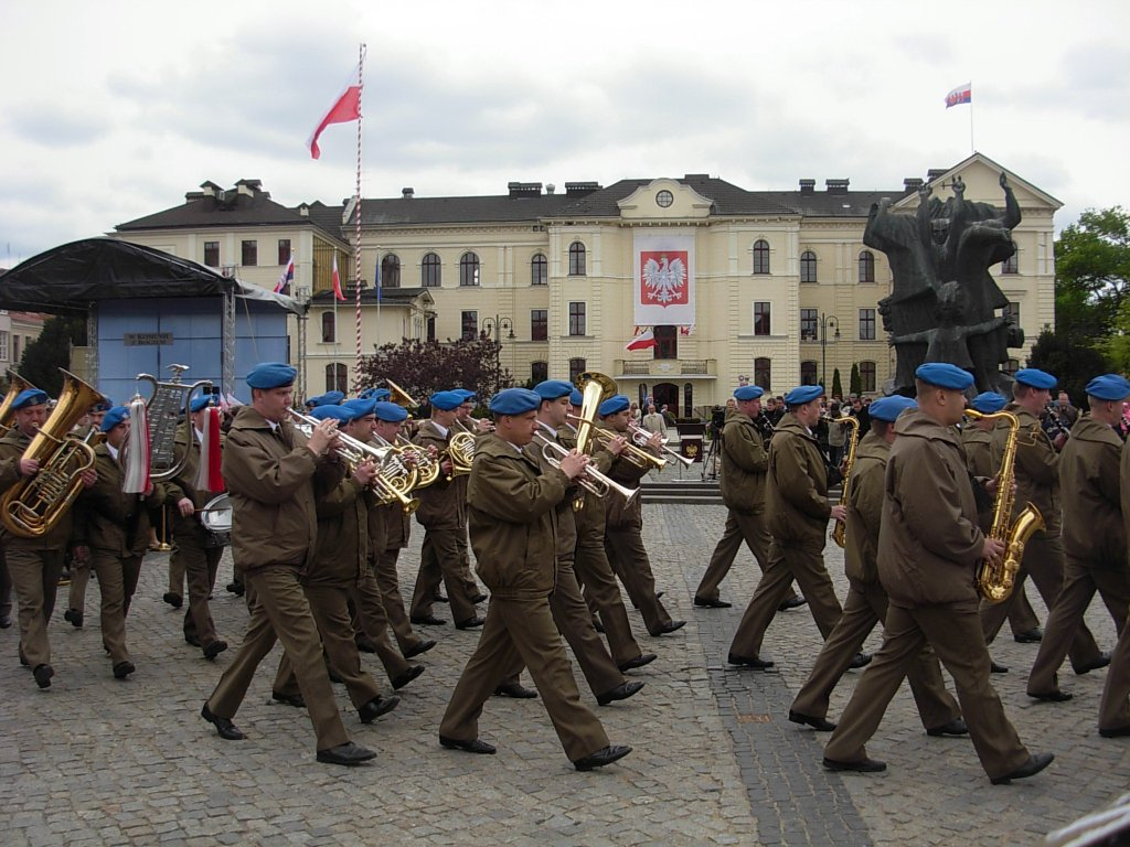 Obchody Święta 3 Maja na Starym Rynku w Bydgoszczy. Występ orkiestry reprezentacyjnej Pomorskiego Okręgu Wojskowego.